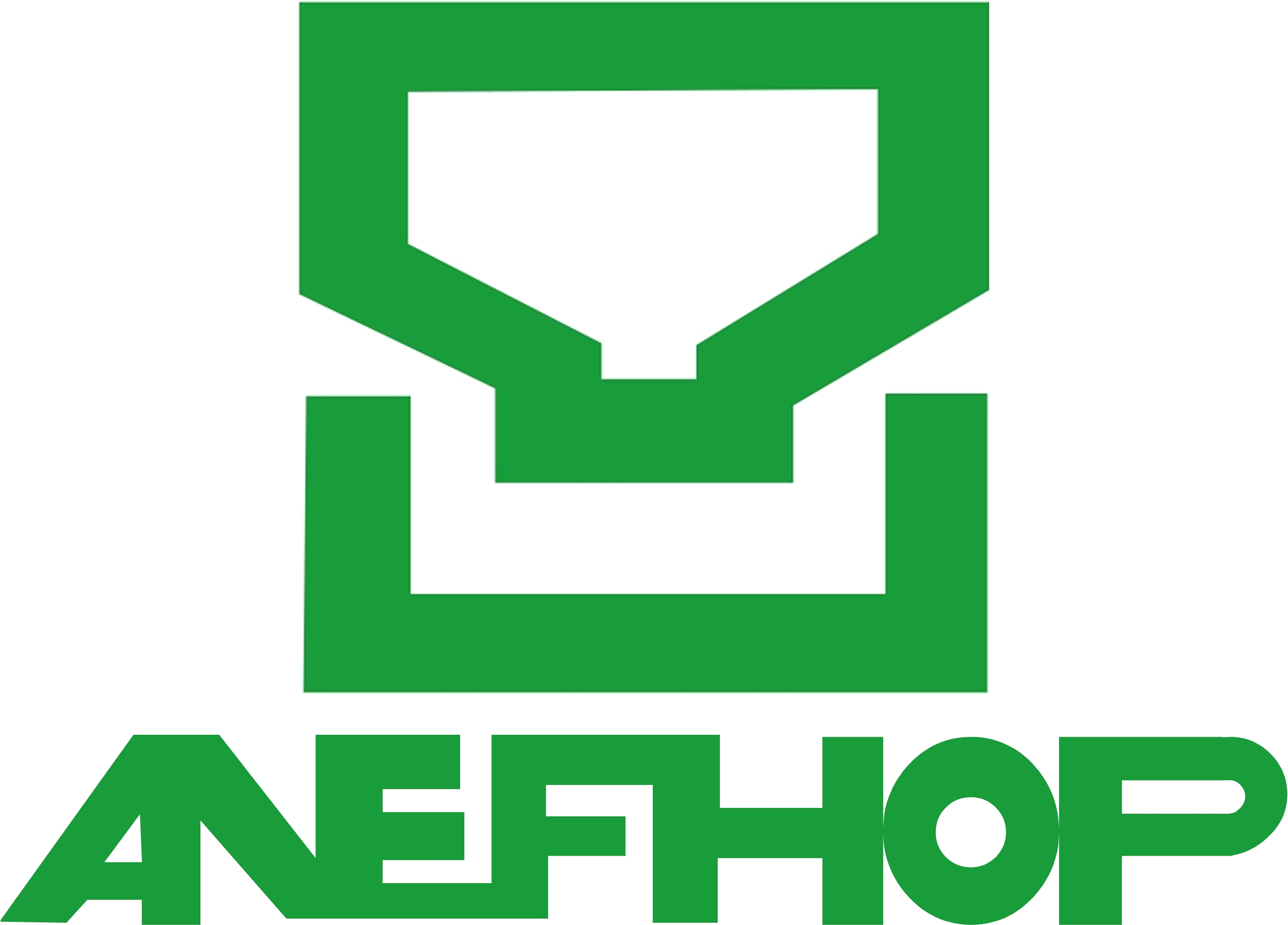 Logo ANEFHOP